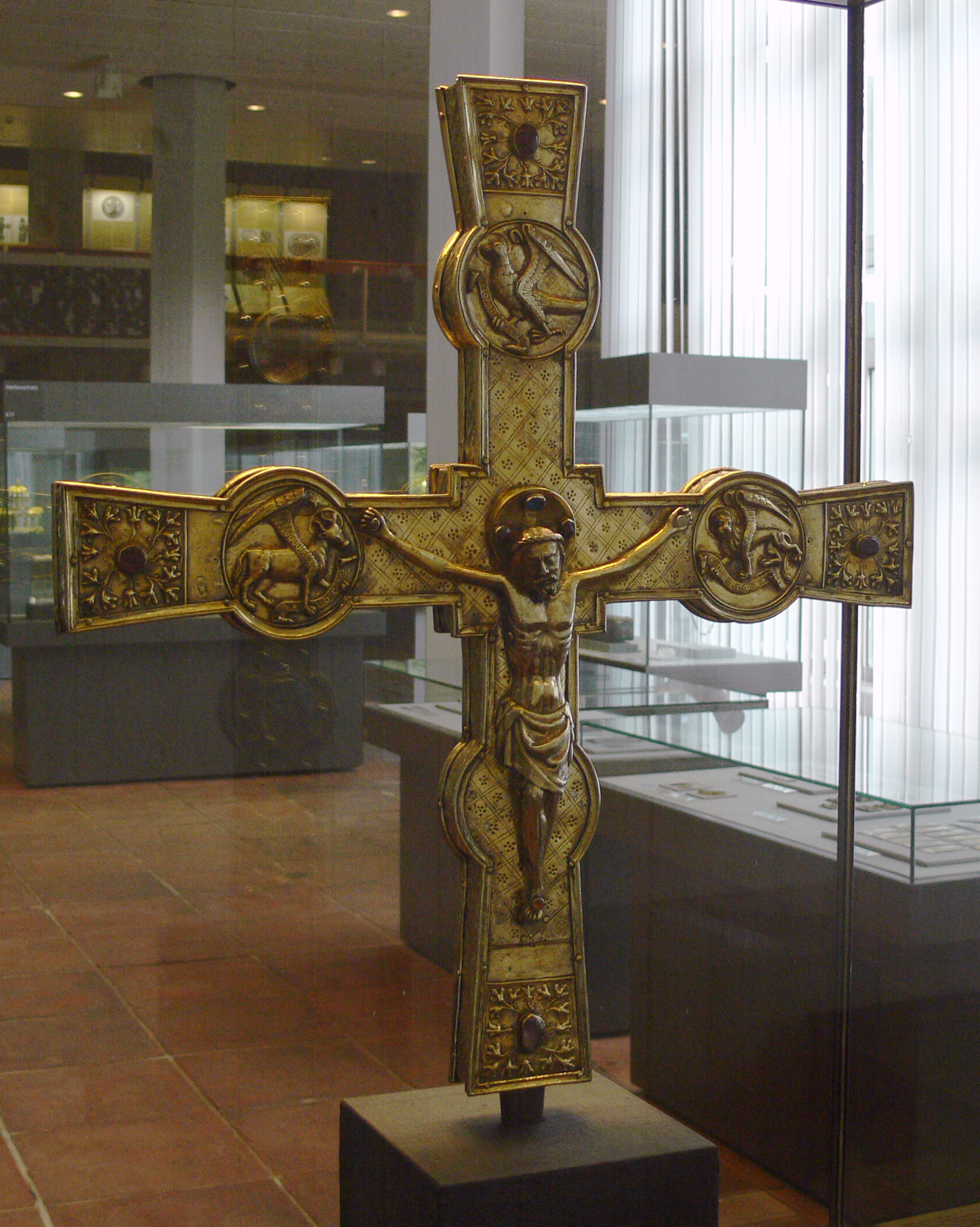 „Heinrichskreuz“ aus dem Münsterschatz in Basel. Kunstgewerbemuseum Berlin, Inv. Nr. 17,79. Rückseite: Silber vergoldet, Basel, 14. und 15. Jh.